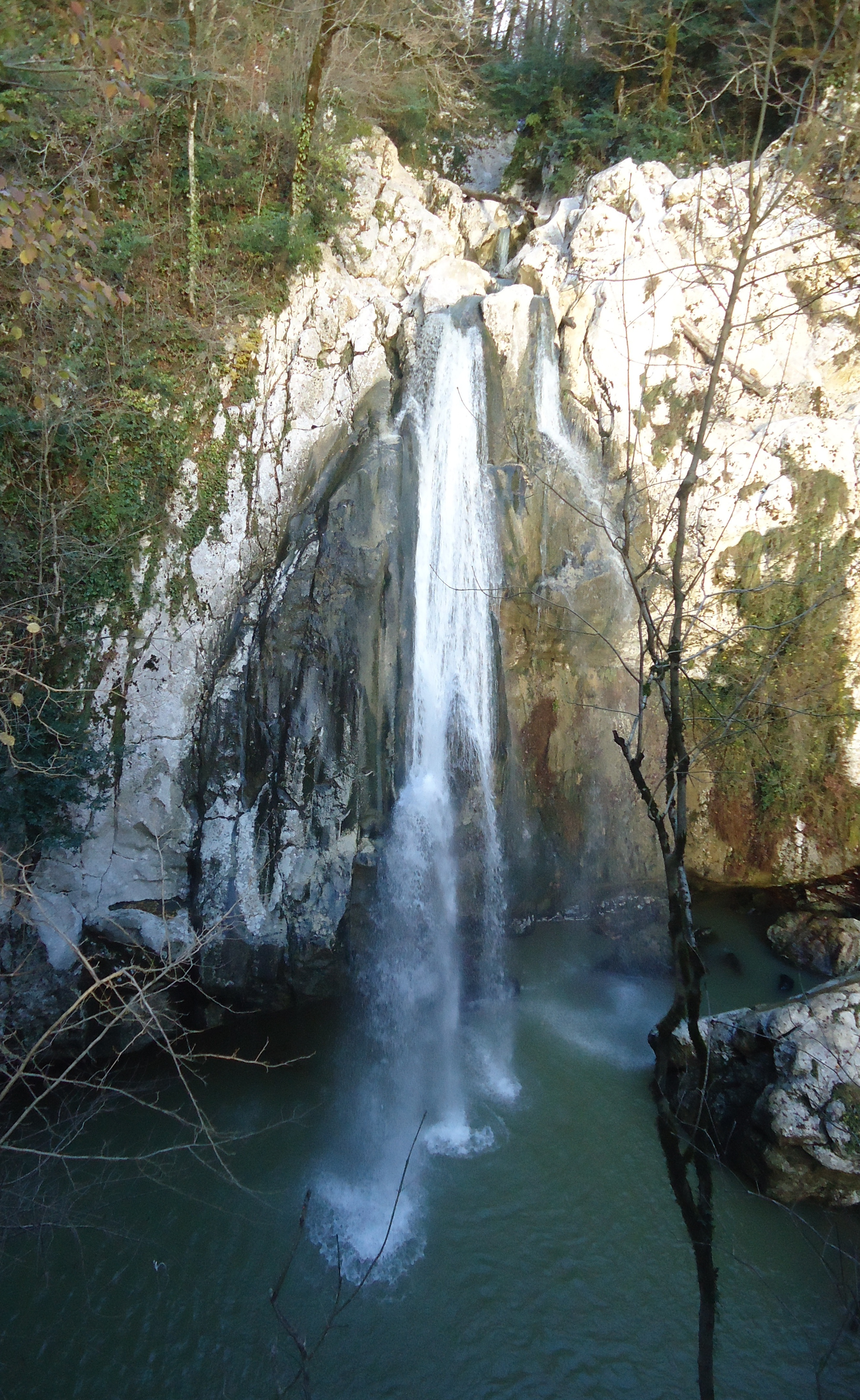 Верхний Агурский водопад в окрестностях города Сочи